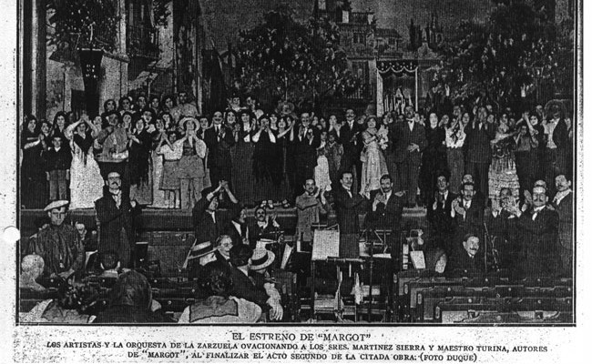 Ovació dels artistes i de l'orquestra a Joaquín Turina i a Gregorio Martínez Sierra, després de la finalització del segon acte